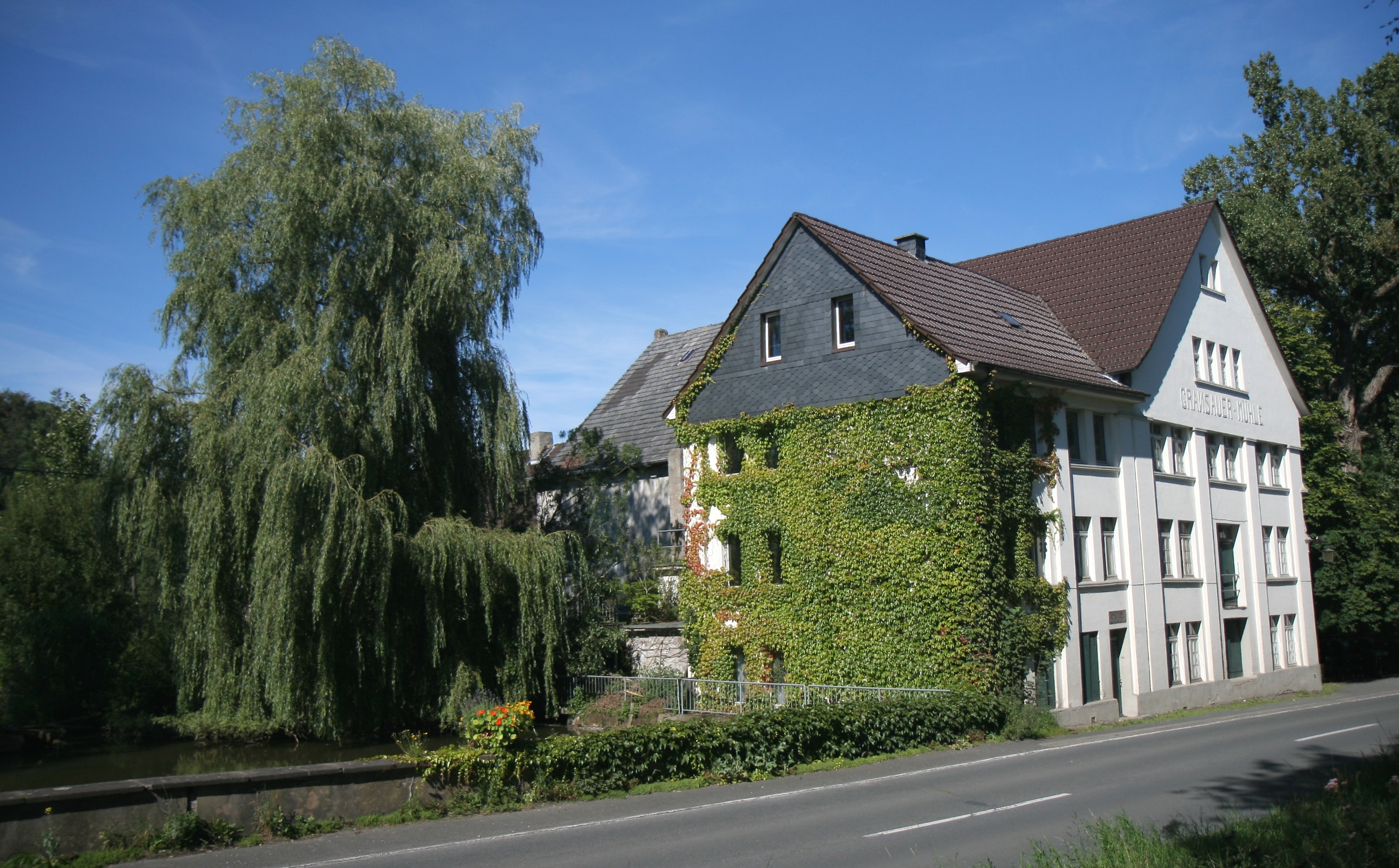 Balve, Gransau. "Mühle auf der Gransau", vormals Kurfürstlich Kölnische Bannmühle, erbaut unter Erzbischof Dietrich II um 1240.